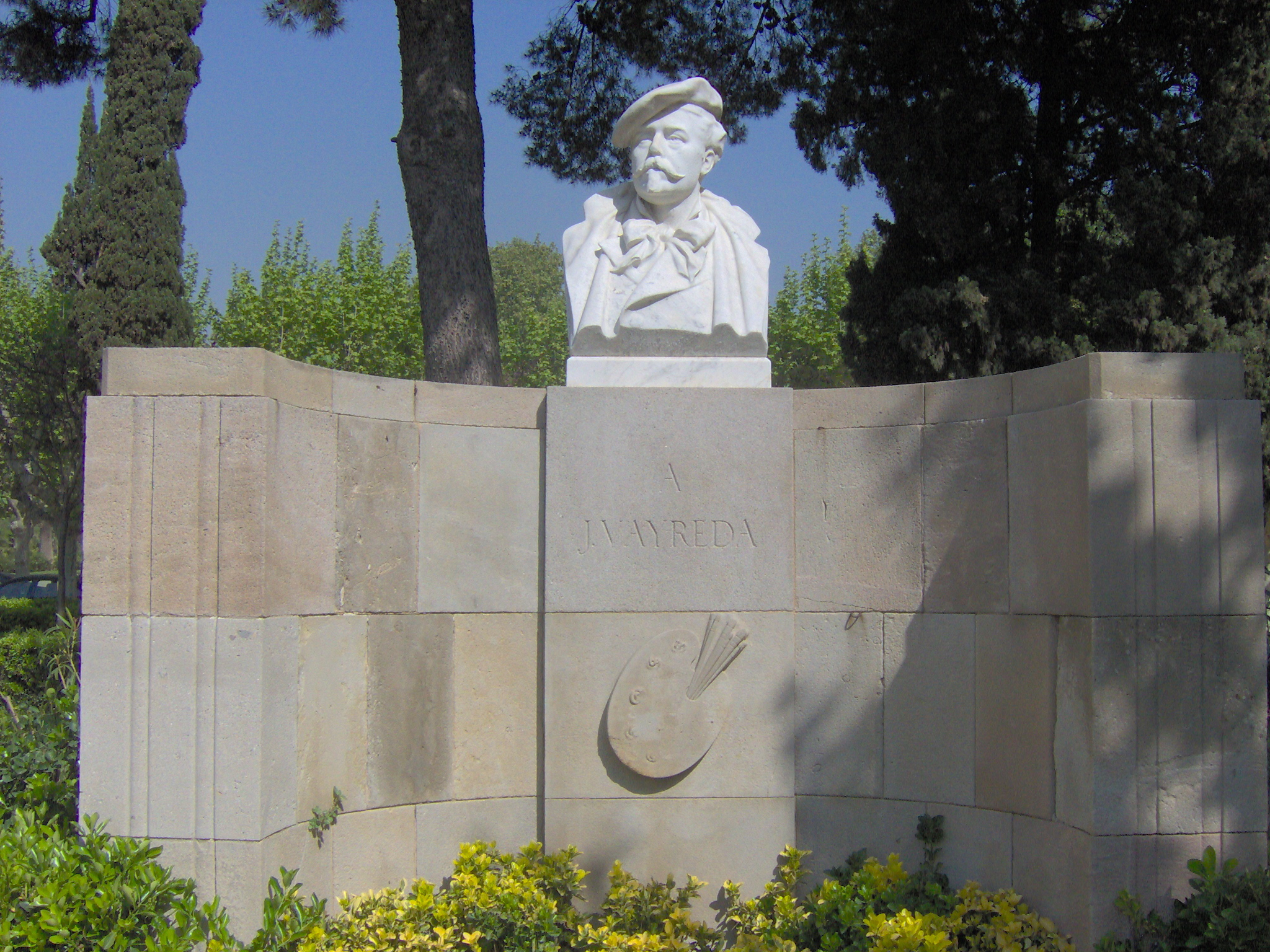 BARCELONA - Monument dedicat al pintor Vayreda, al Parc de la Ciutadella